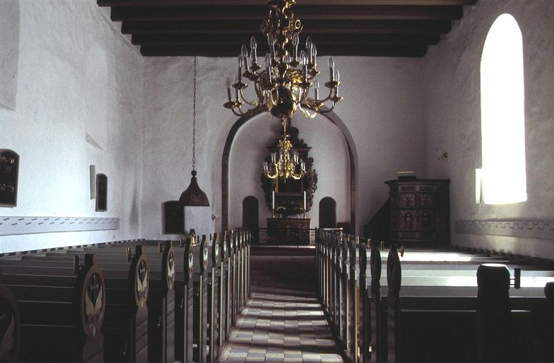 Højslev Kirke, Kirkerummet set mod øst